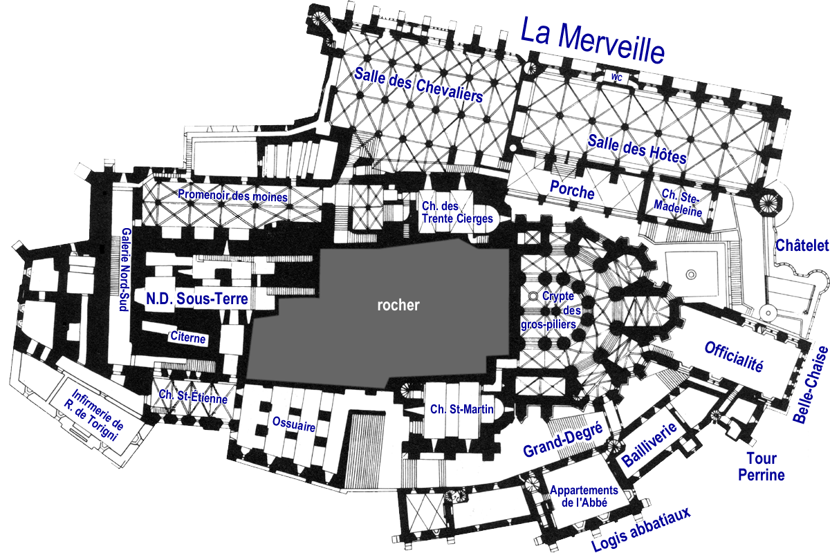 Plan au niveau de la salle de l'Aquilon. Plan retouché et légendé par Utilisateur:Emdx d'après l'édition anastaltique de "Le Mont Saint-Michel"(1910) de Paul Gout (1852-1923).